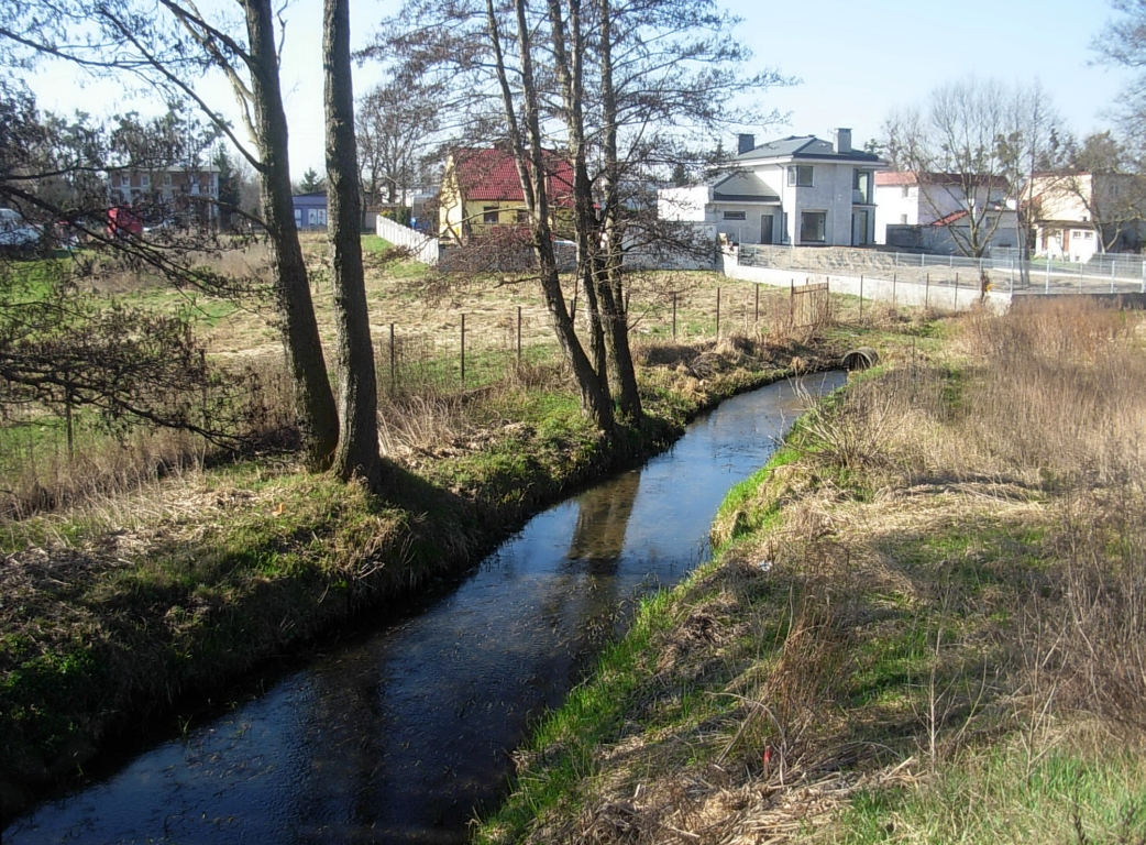 Struga Flis na osiedlu Flisy w Bydgoszczy